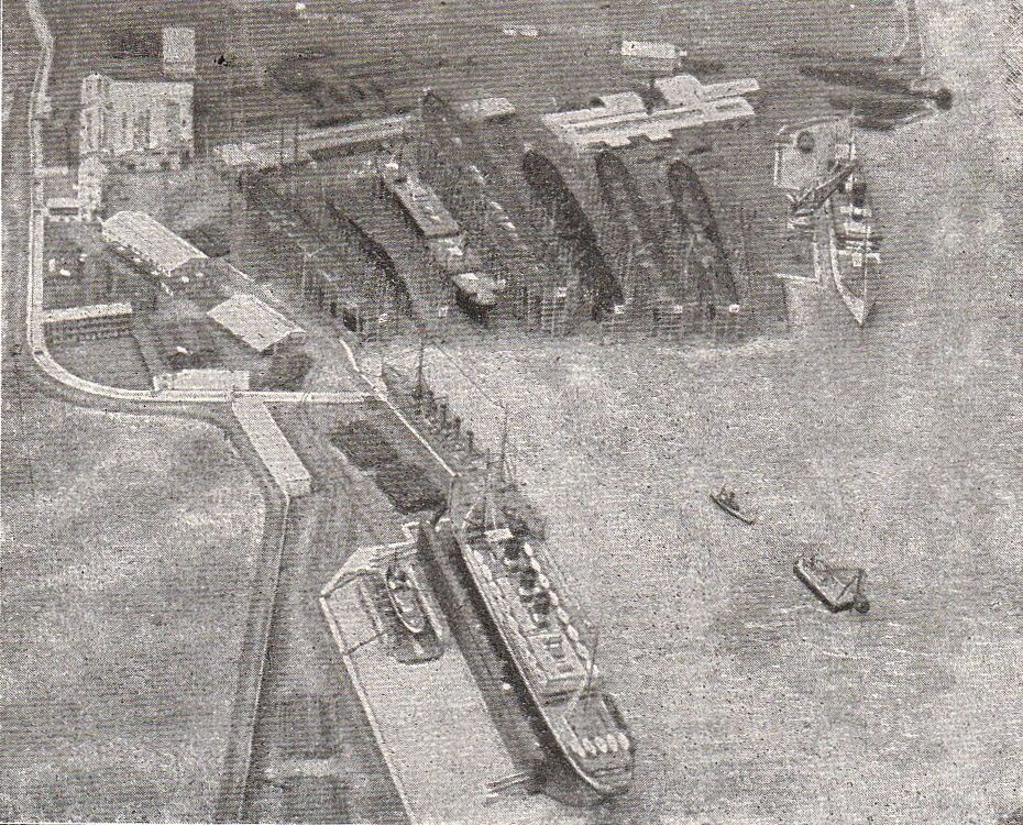 Ansicht der Stapel, Docks und eines Teiles der Werkstätten des Cantiere Navale Triestino.